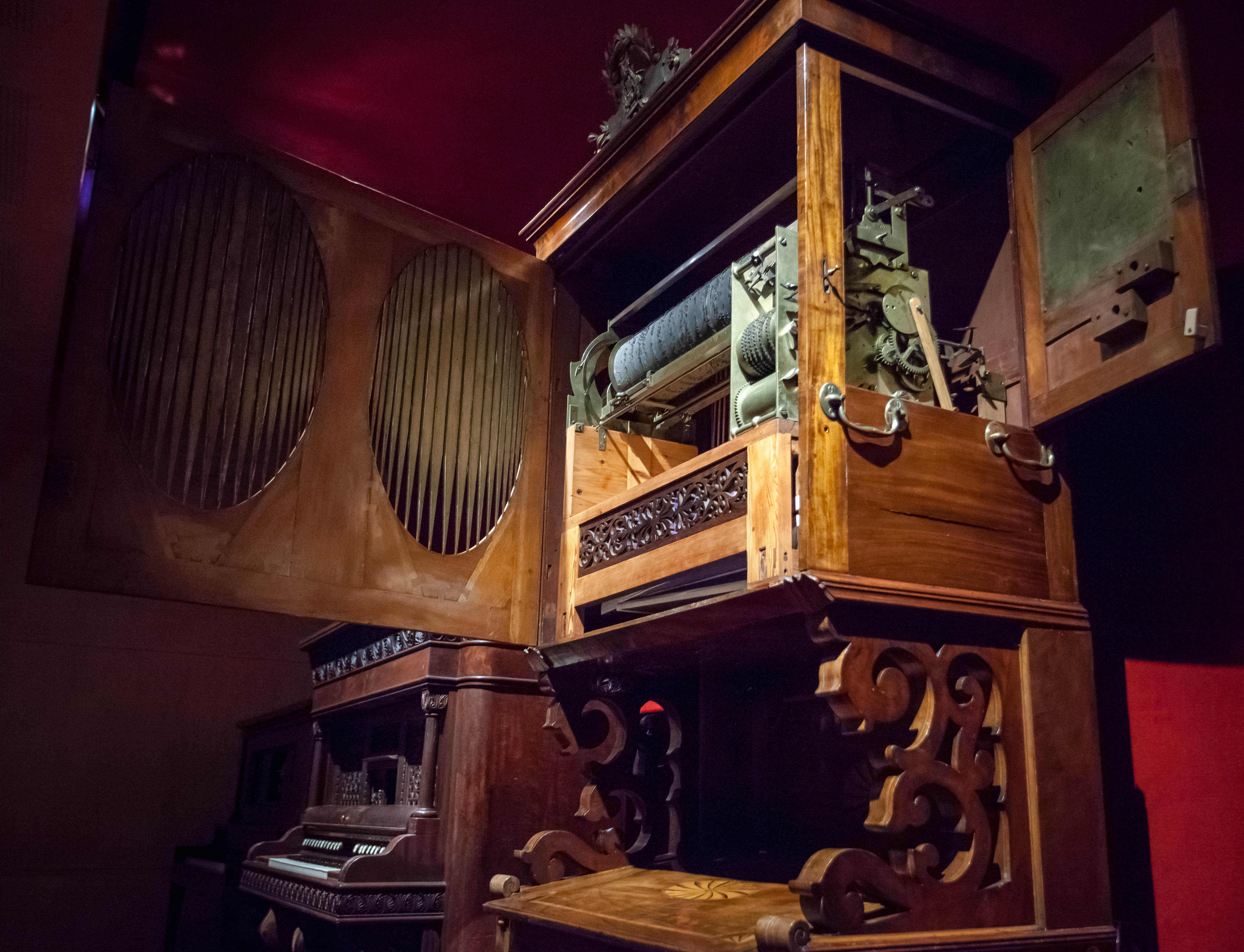 Orgue de maneta, Diego Evans, MDMB 35